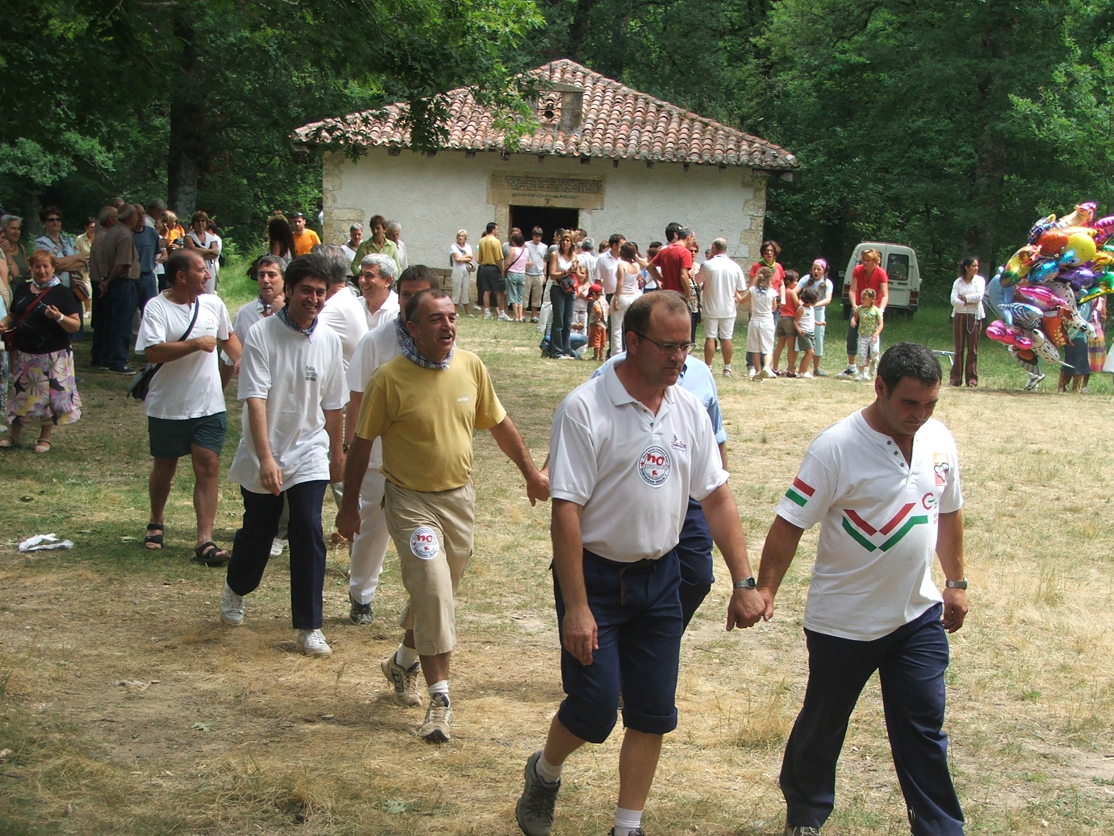 Altsasuko San Pedro baselizaren inguruan egiten den erromeria. Romeria en la ermita de San Pedro en Alsasua. Fiesta in the San Pedro church near Alsasua/Altsasu.